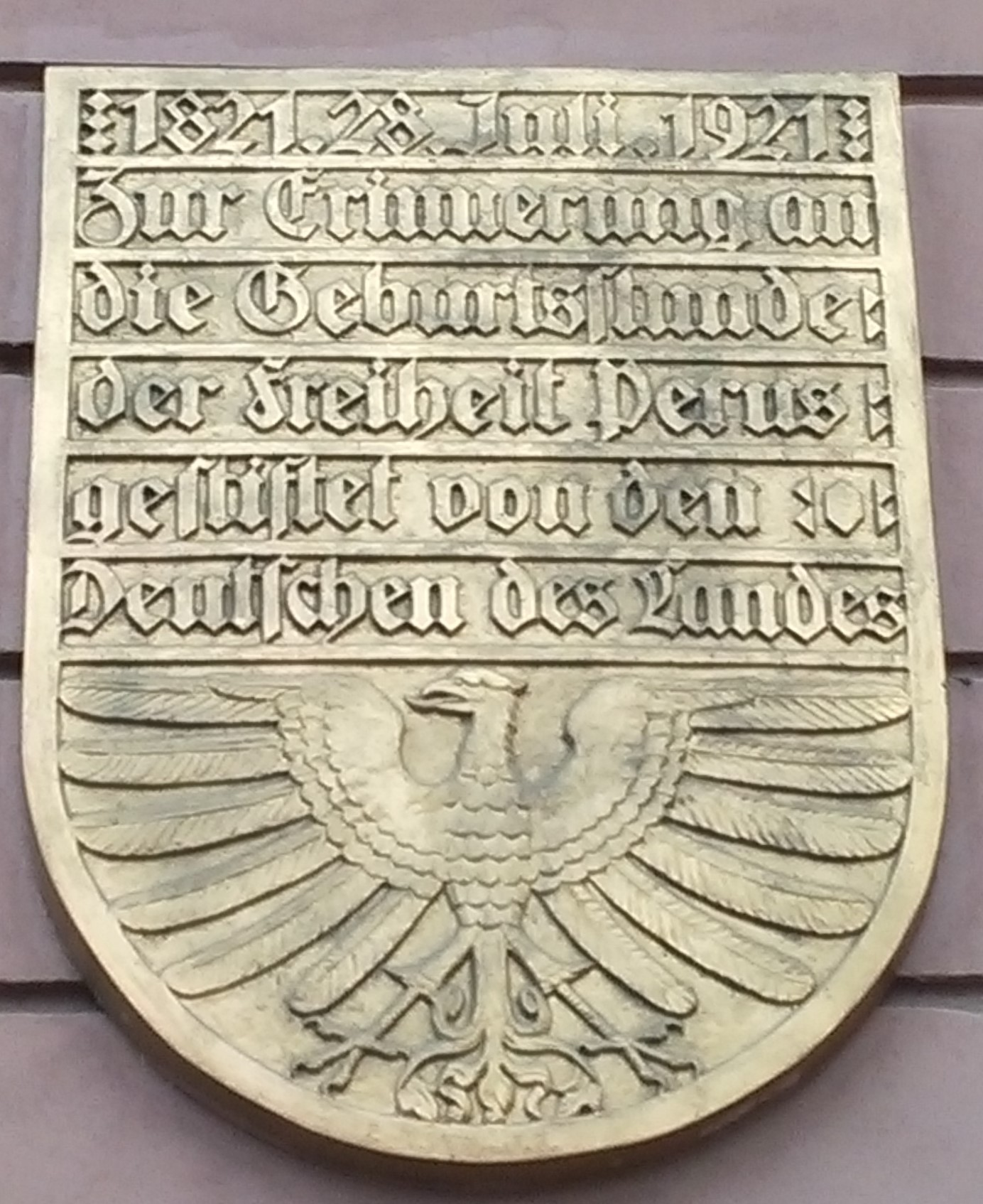 Bronzetafel am Torre Alemana